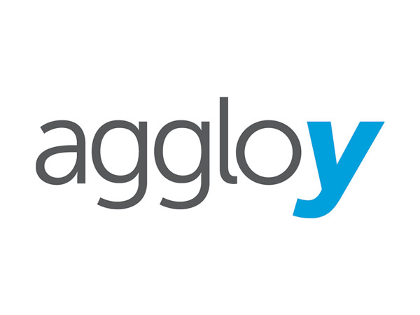 Logo AggloY dès 2016